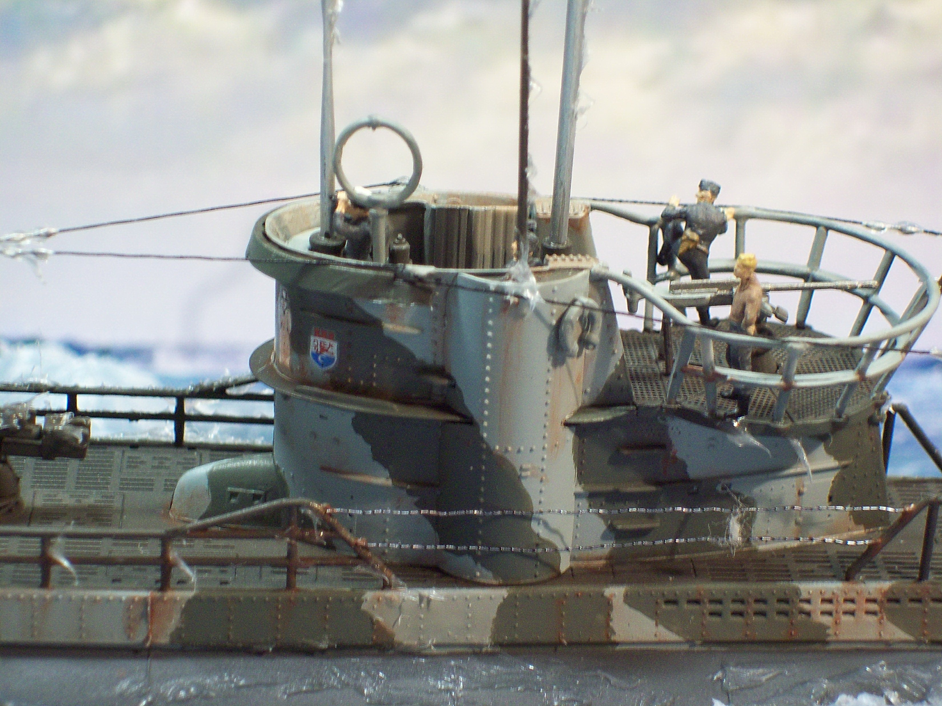 u boot VIIC maquette au 1/144